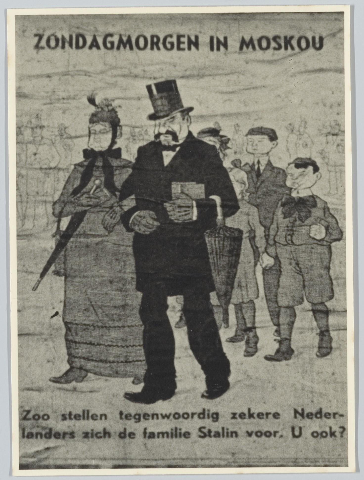 Beschrijving Duits propaganda-affiche waarin de Duitsers de Nederlanders die hopen op een Russische overwinning op de hak nemen Documenttype foto Vervaardiger Onbekend Anoniem Collectie Collectie Stadsarchief Amsterdam: foto-afdrukken Datering 1944 Inventarissen Afbeeldingsbestand ANWE00213000004